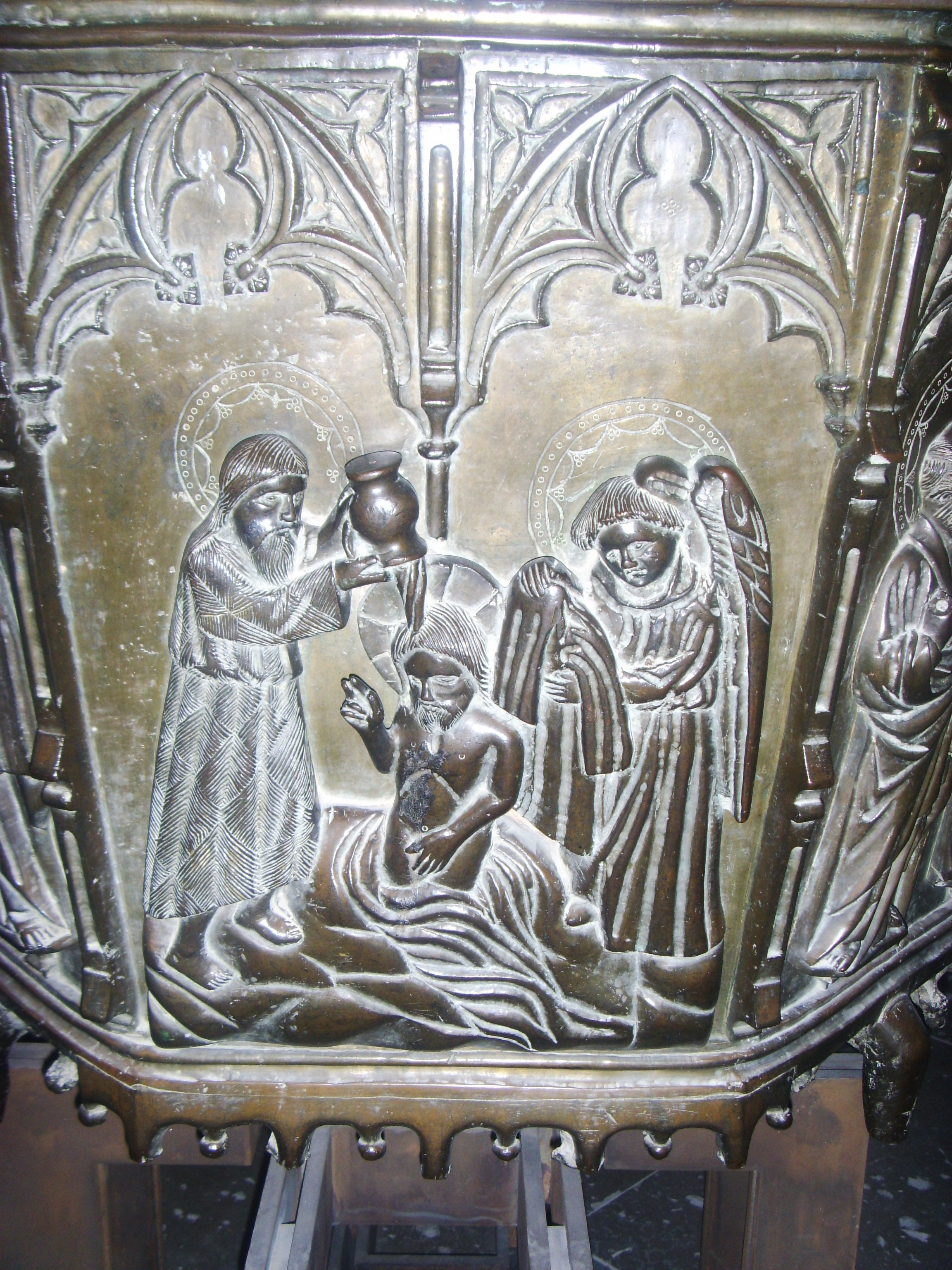 Dopfunt